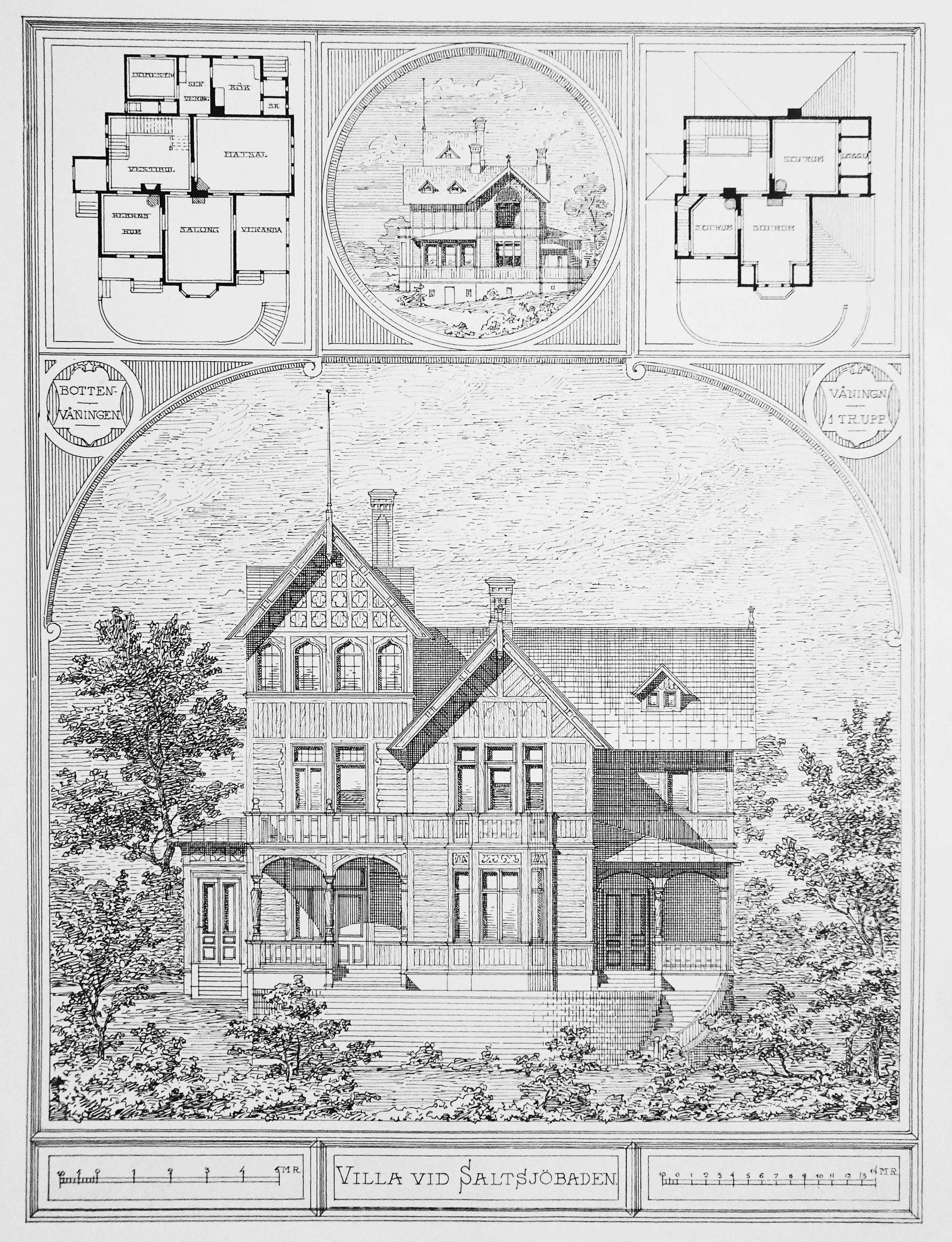 "Villa vid Saltsjöbaden", Saltsjöpromenaden 18, även kallad "Kråkslottet"